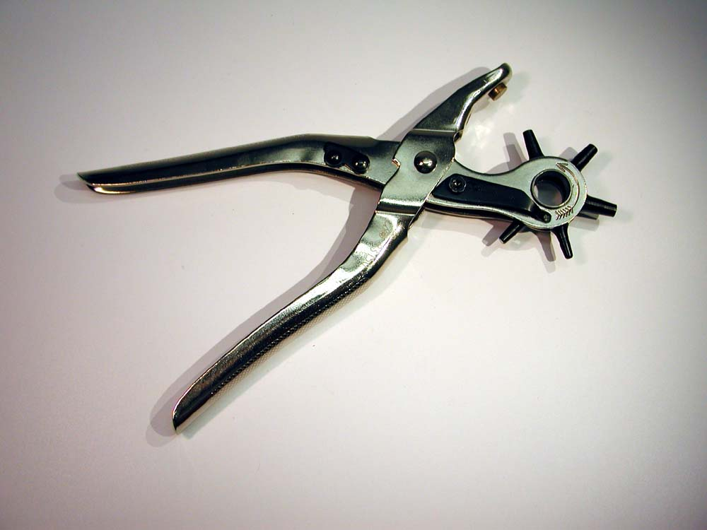 Große Lochzange